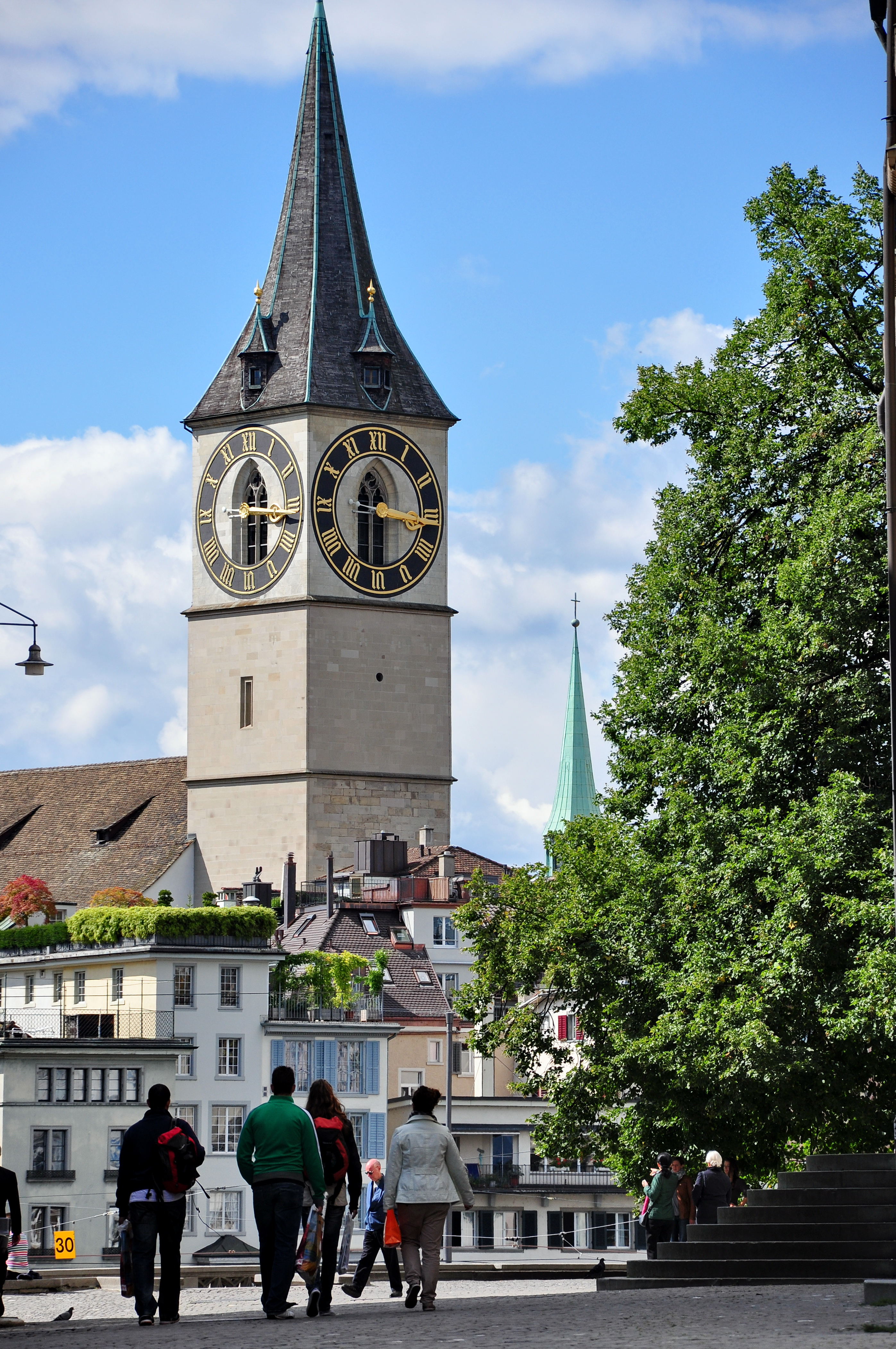 St. Peter as seen from Grossmünsterplatz in Zürich (Switzerland)